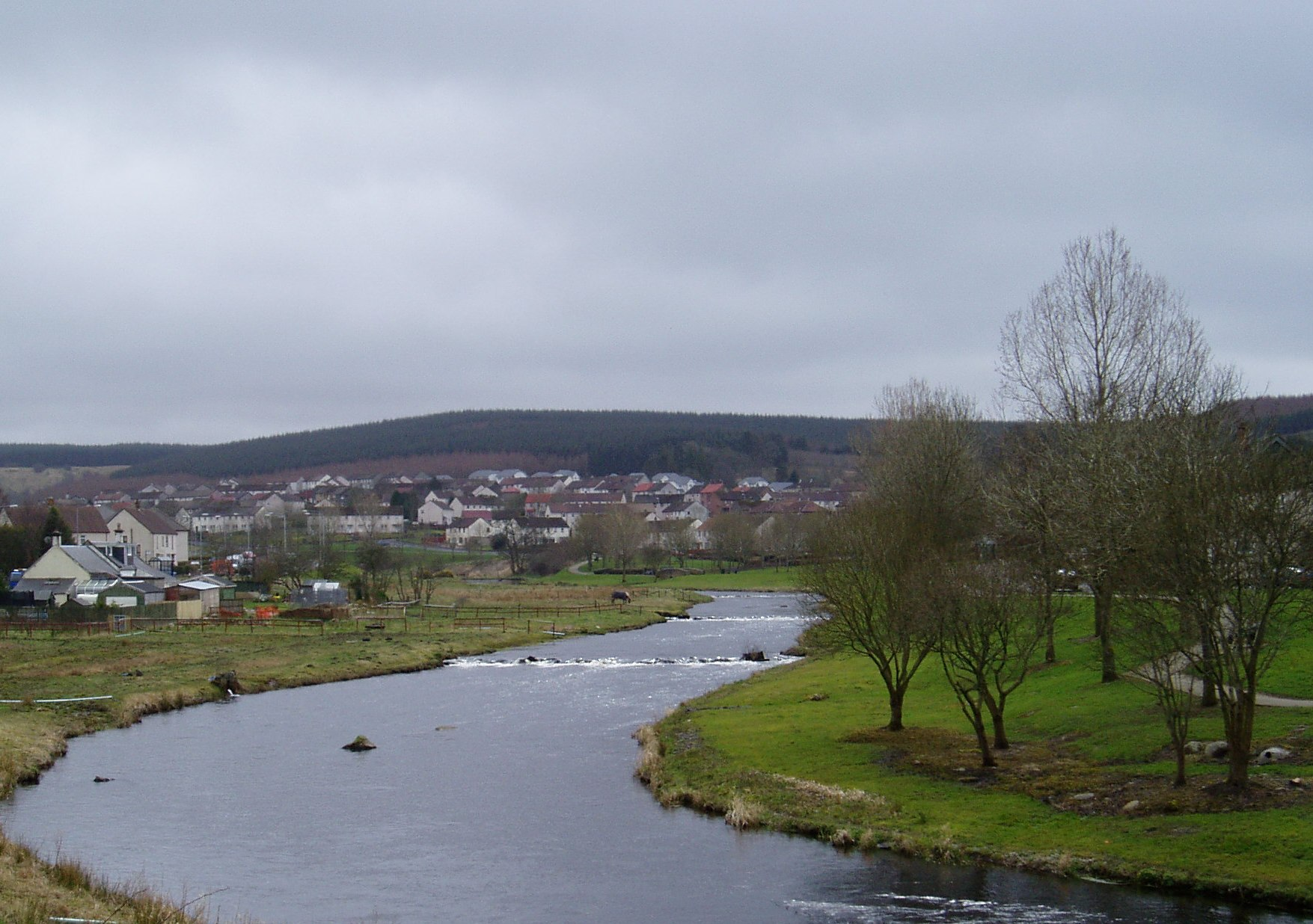 Patna, Ayrshire